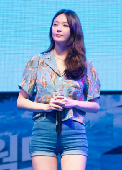 17.07.29 오션월드 놀존심콘서트 - 다비치 직찍